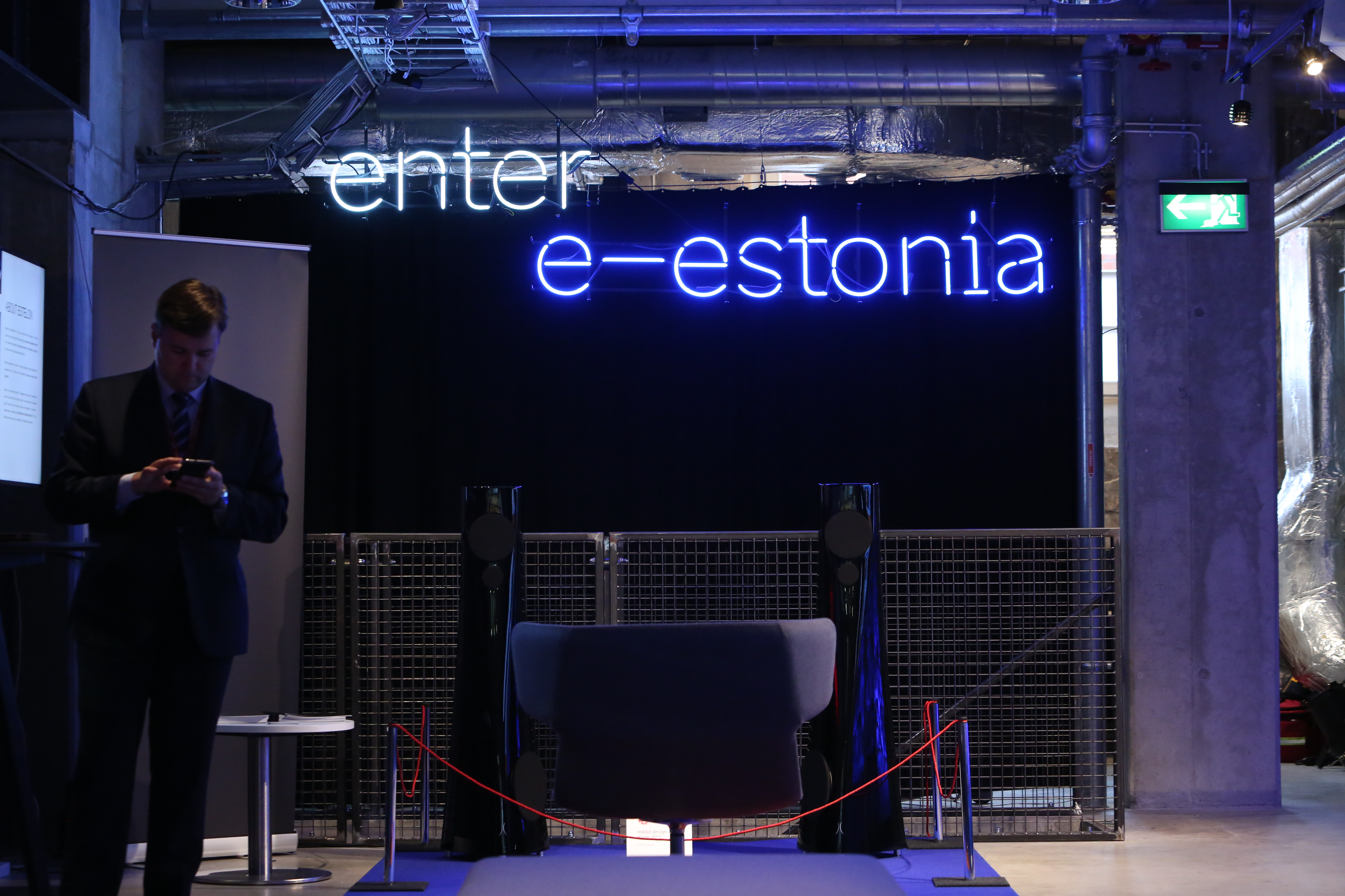 Photo: Annika Haas (EU2017EE)